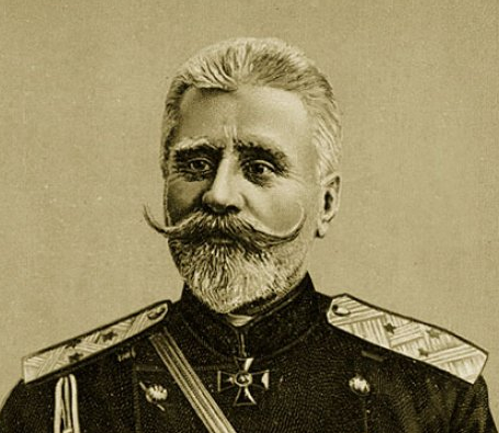 Командир Порт-Артурской крепости генерал-лейтенант К.Н. Смирнов (1854—1930) (Хромолитогр. Д.Н. Плющеева, Одесса, 1904 г.)